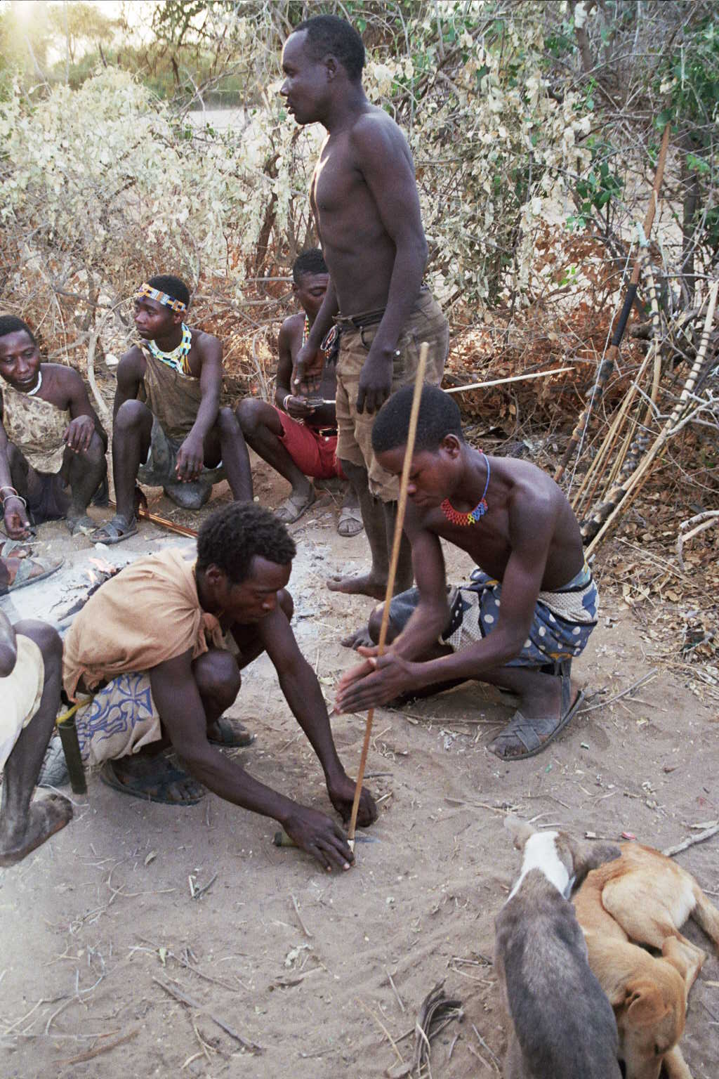 Hadzabe Men setting fire